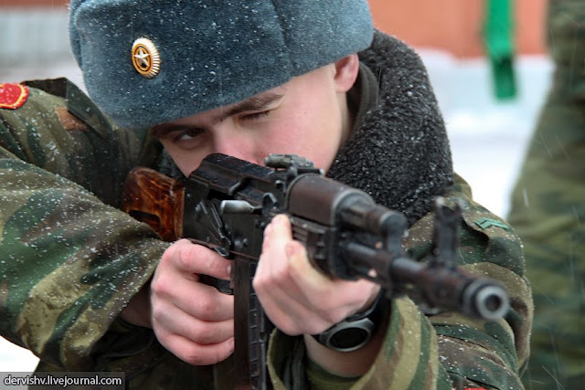 Стрелок на стрелковой позиции